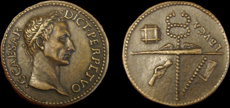 Falso sesterzio di Giulio Cesare, n° di inventario 1241 del Medagliere di Milano, esemplare coniato. Una invenzione probabilmente di bottega padovana.